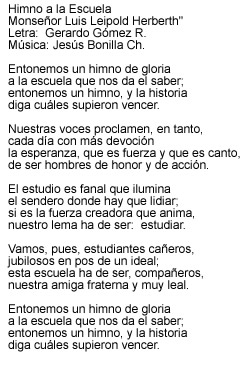 Autor: Gerardo Gómez Ramírez